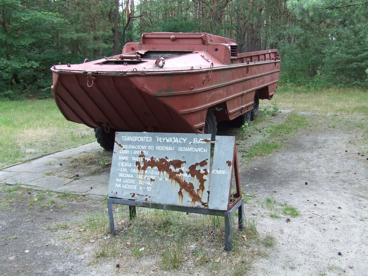 BAW w Skansen Bojowy 1 Armii Wojska Polskiego w Mniszewie